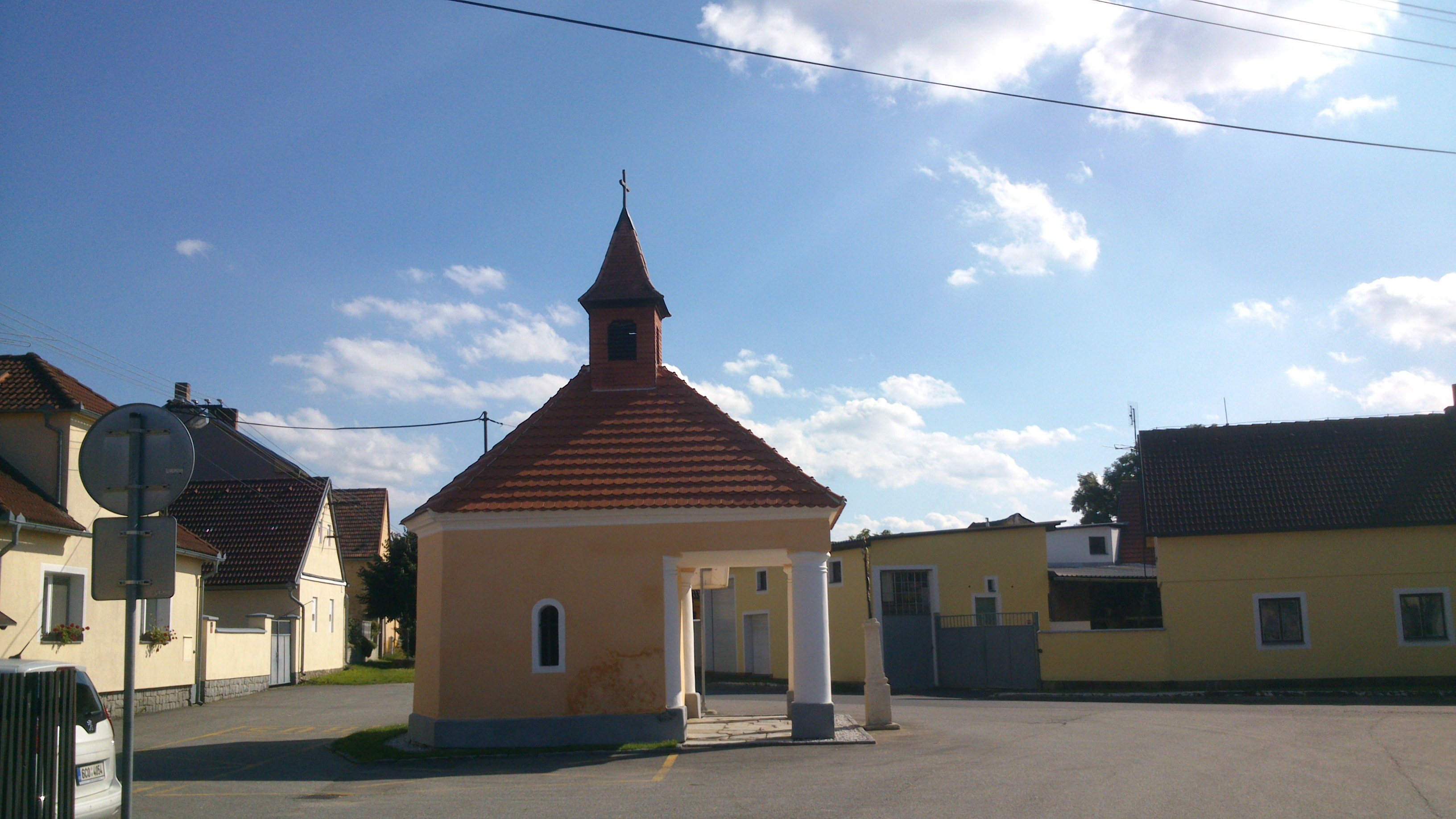 kaplička na návsi